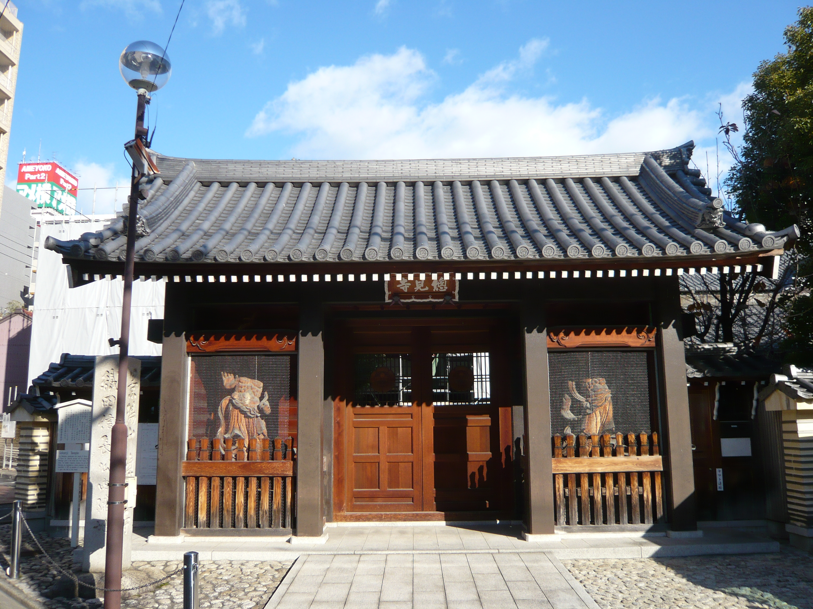 総見寺山門